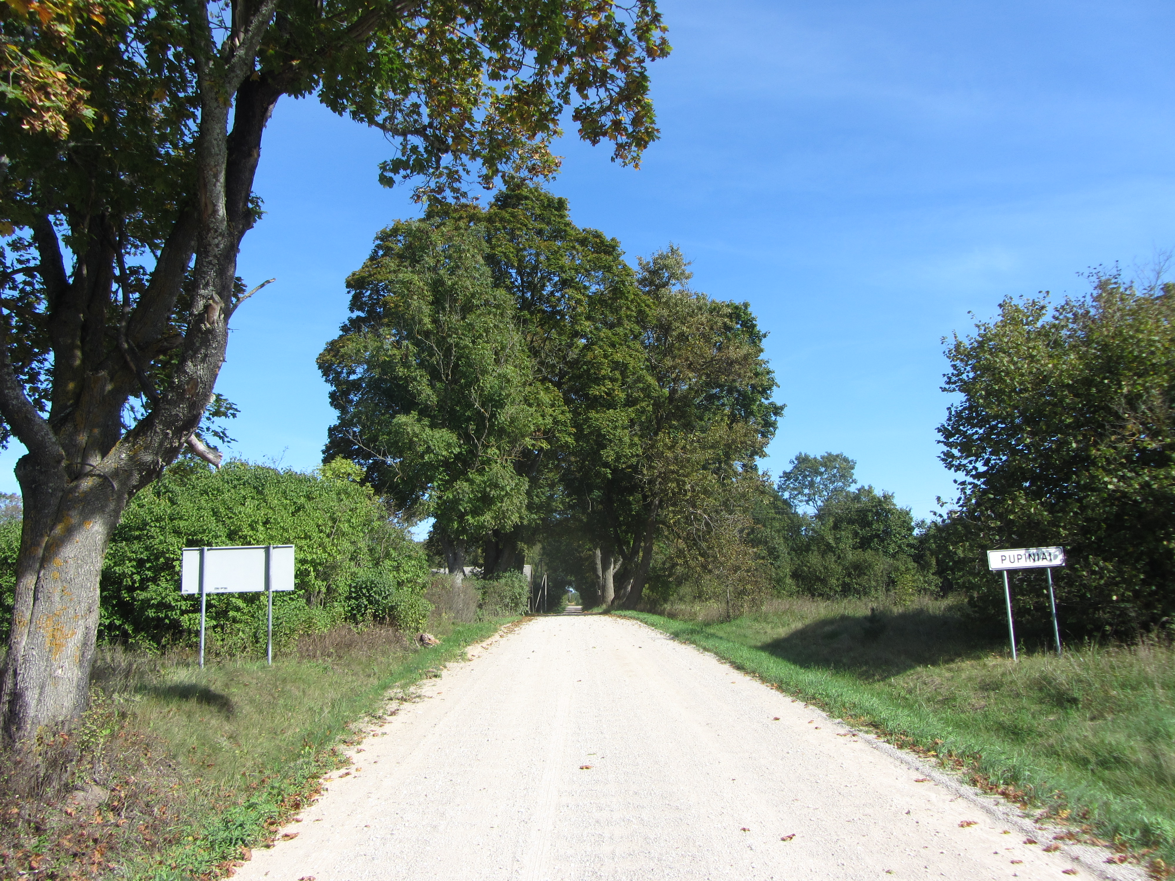 Pupiniai 30284, Lithuania